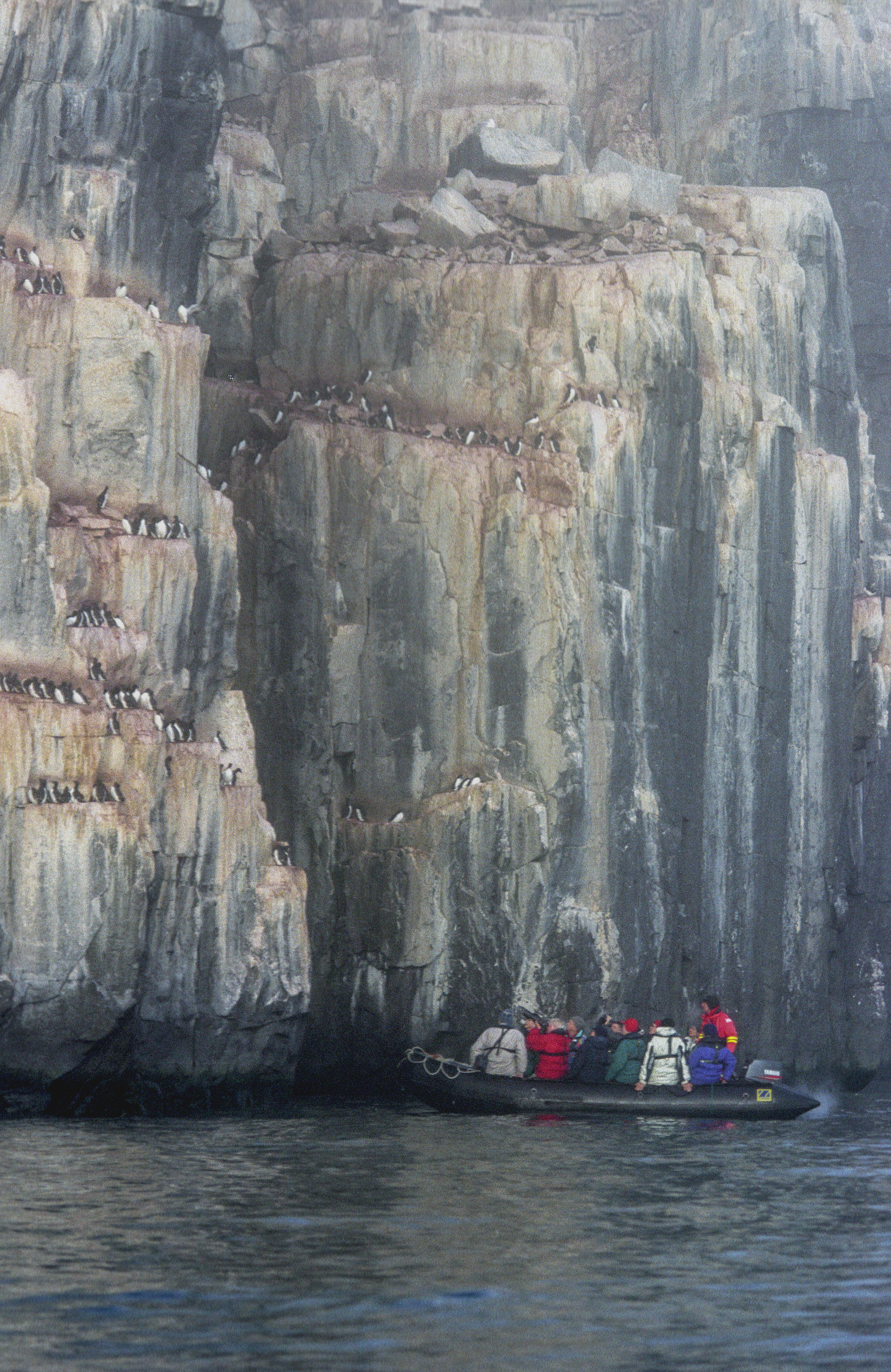 Spitsbergen, Alkefjellet